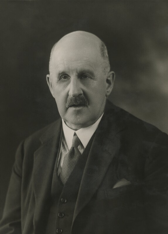 Lord Sanderson